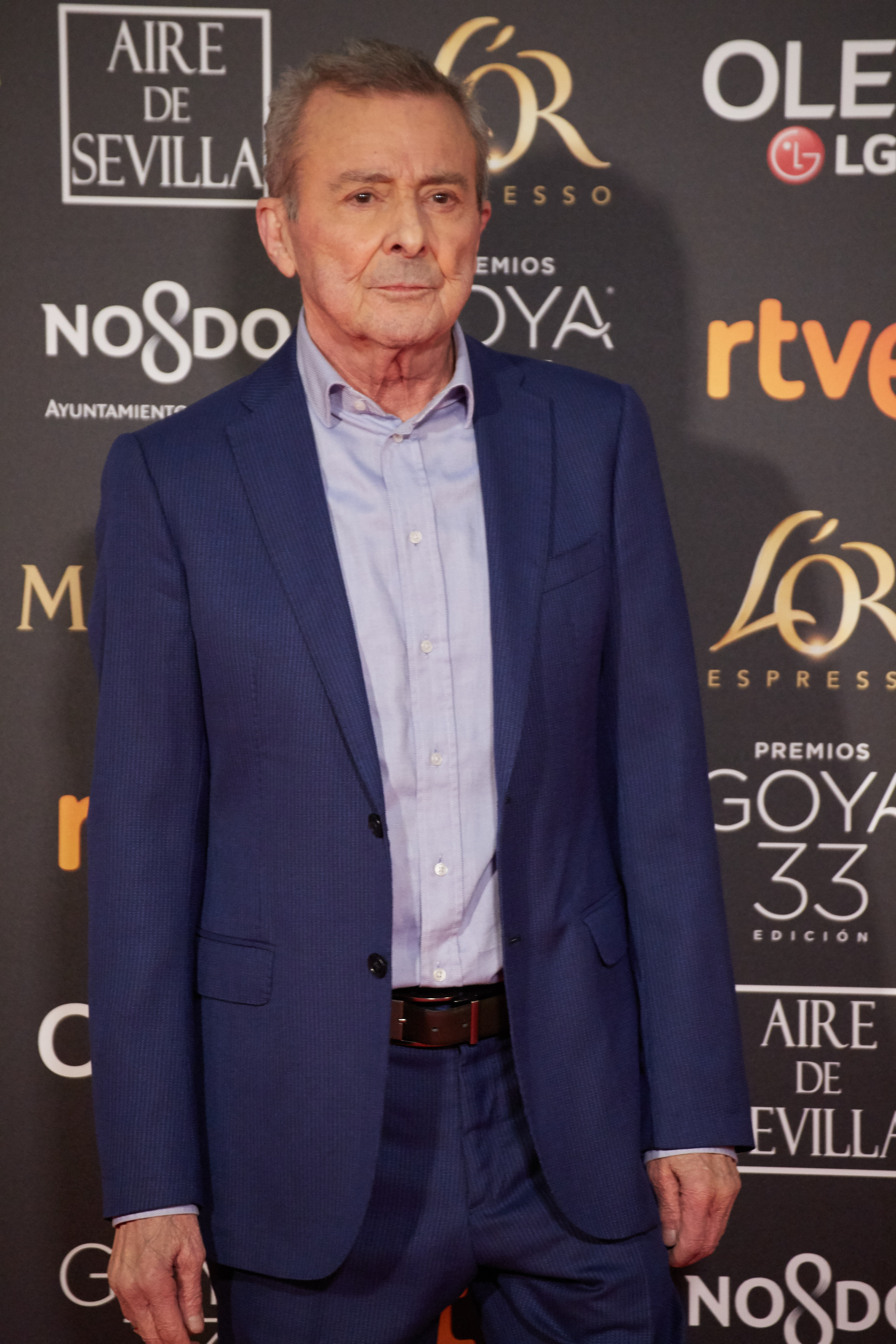 Juan Diego en la alfombra roja de los Premios Goya celebrados en Sevilla en Febrero 2019